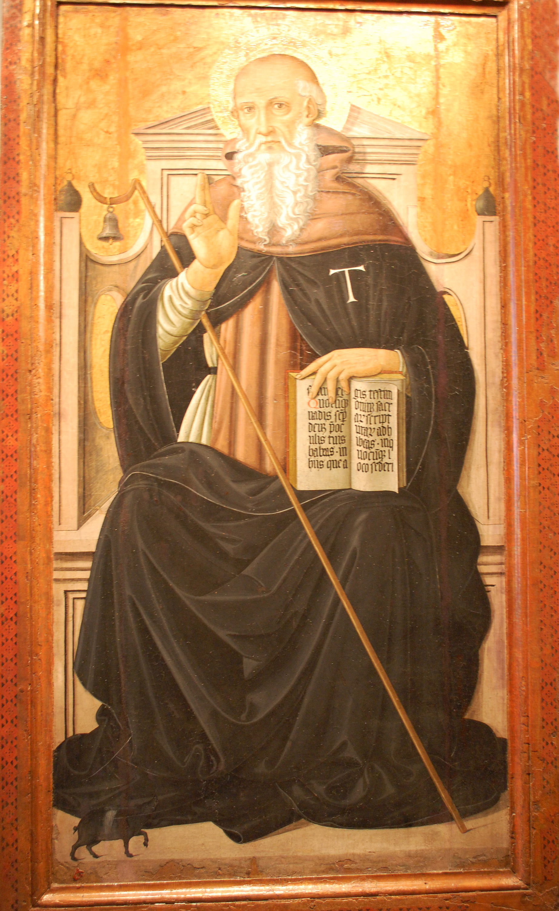 Tavola lignea di Sant'Antonio abate